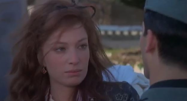 Screenshot del film Teresa la ladra di Carlo di Palma, 1973